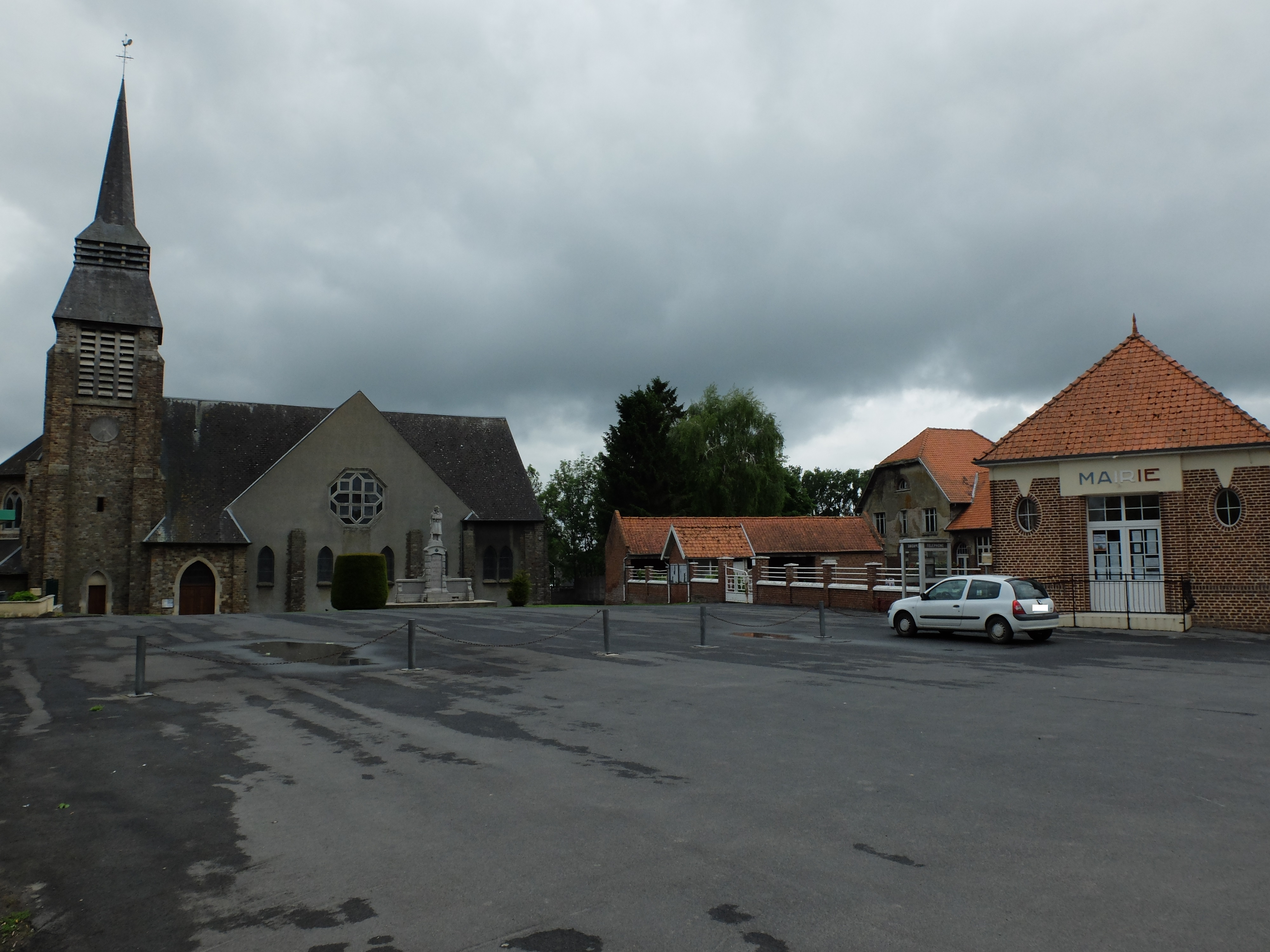 Vue de Pronville-en-Artois : la place, l'église, le monument aux morts et la mairie.